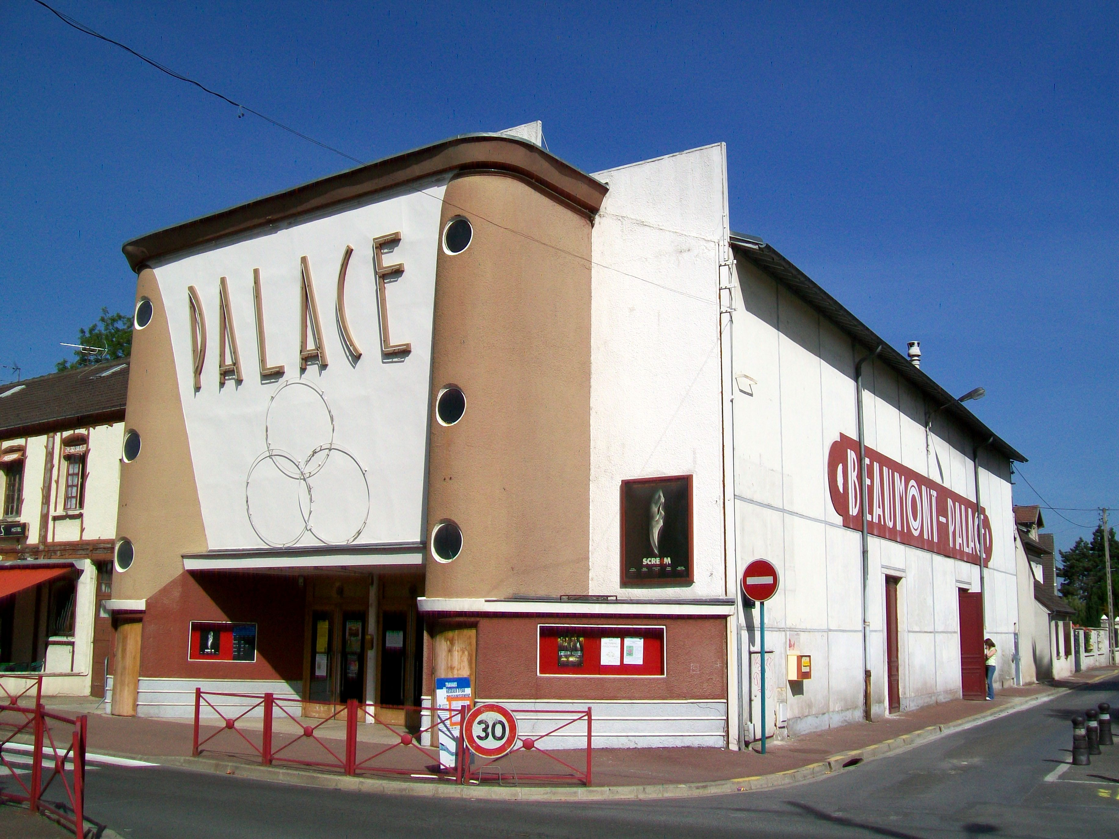 Le cinéma Beaumont-Palace, rue de Paris, à l'angle avec la rue Henri-Pasdeloup.